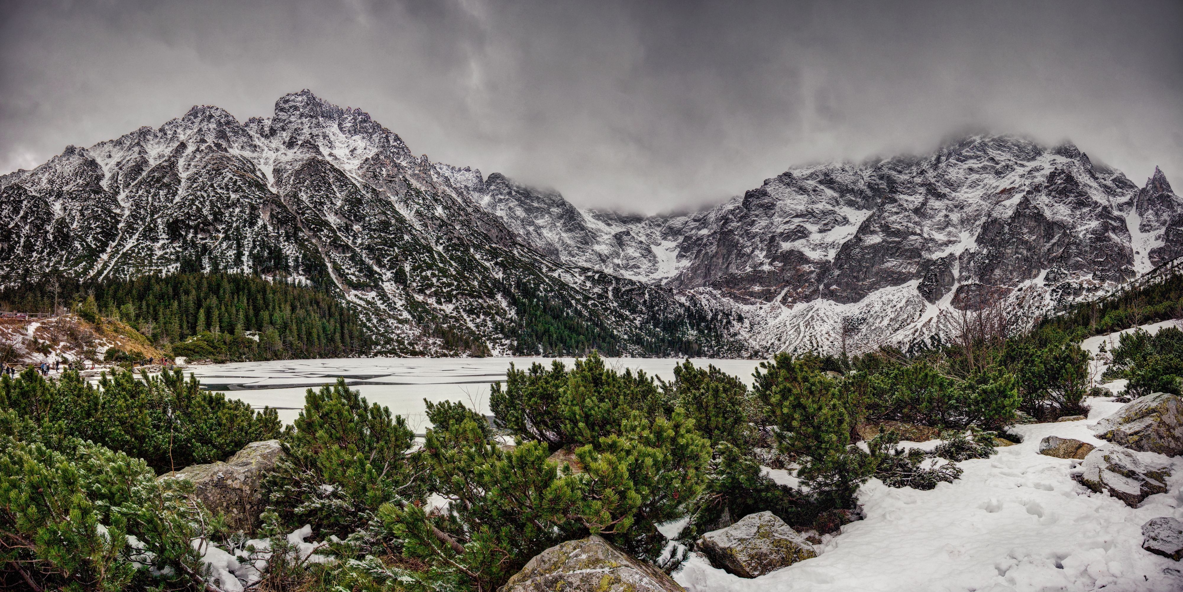 Specjalny obszar ochrony siedlisk Tatry. This is a photography of Natura 2000 protected area with ID PLC120001